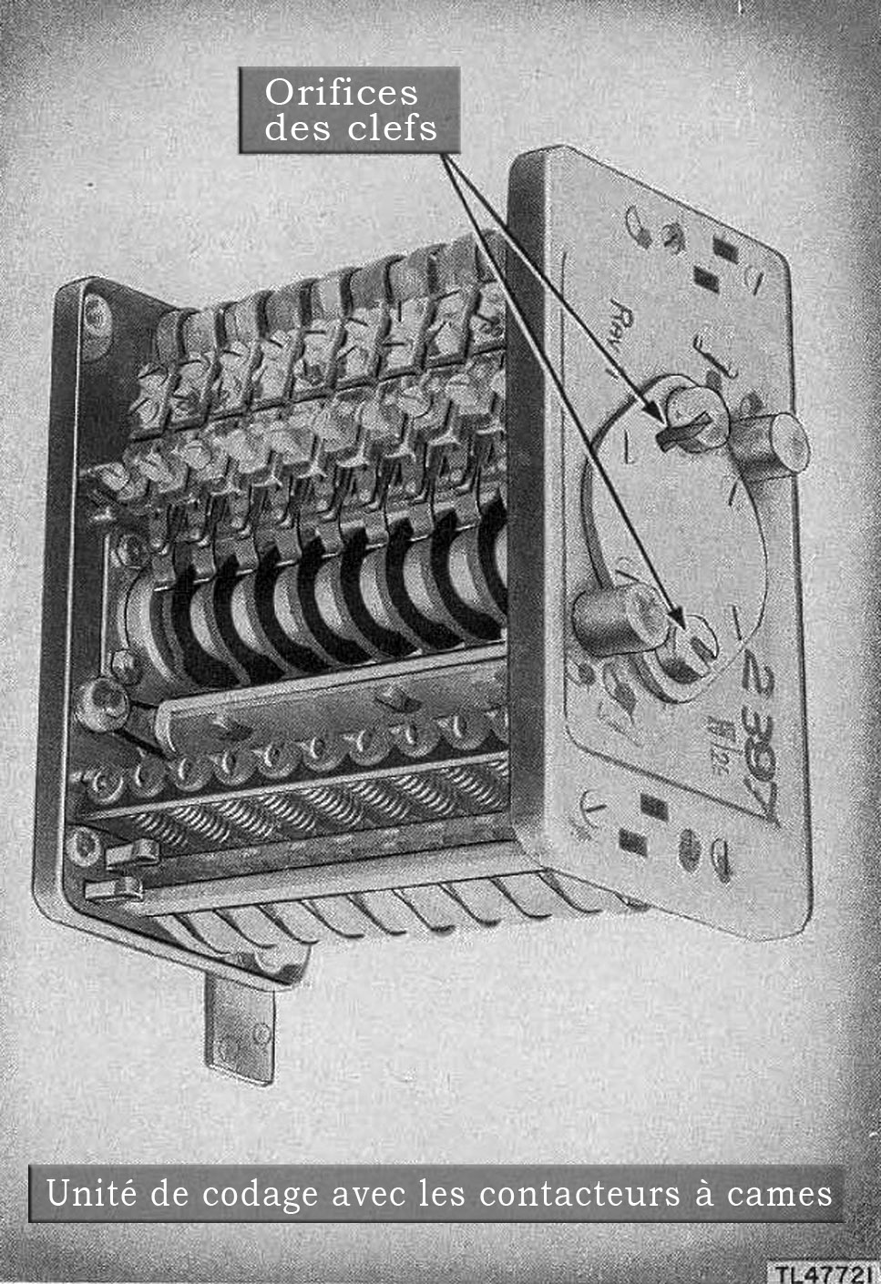 FuG-25a "Erstling" Codegeber. Nockenschaltwerk mit Aufnahme für 2 Codierschlüssel